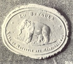 Siegel von Lobengula (1833-1894), König von Matabele